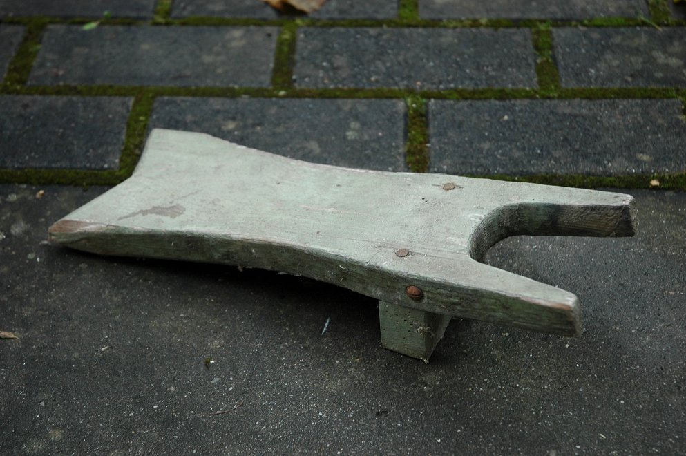 Stiefelknecht (Selbstbau aus Fichtenholz)